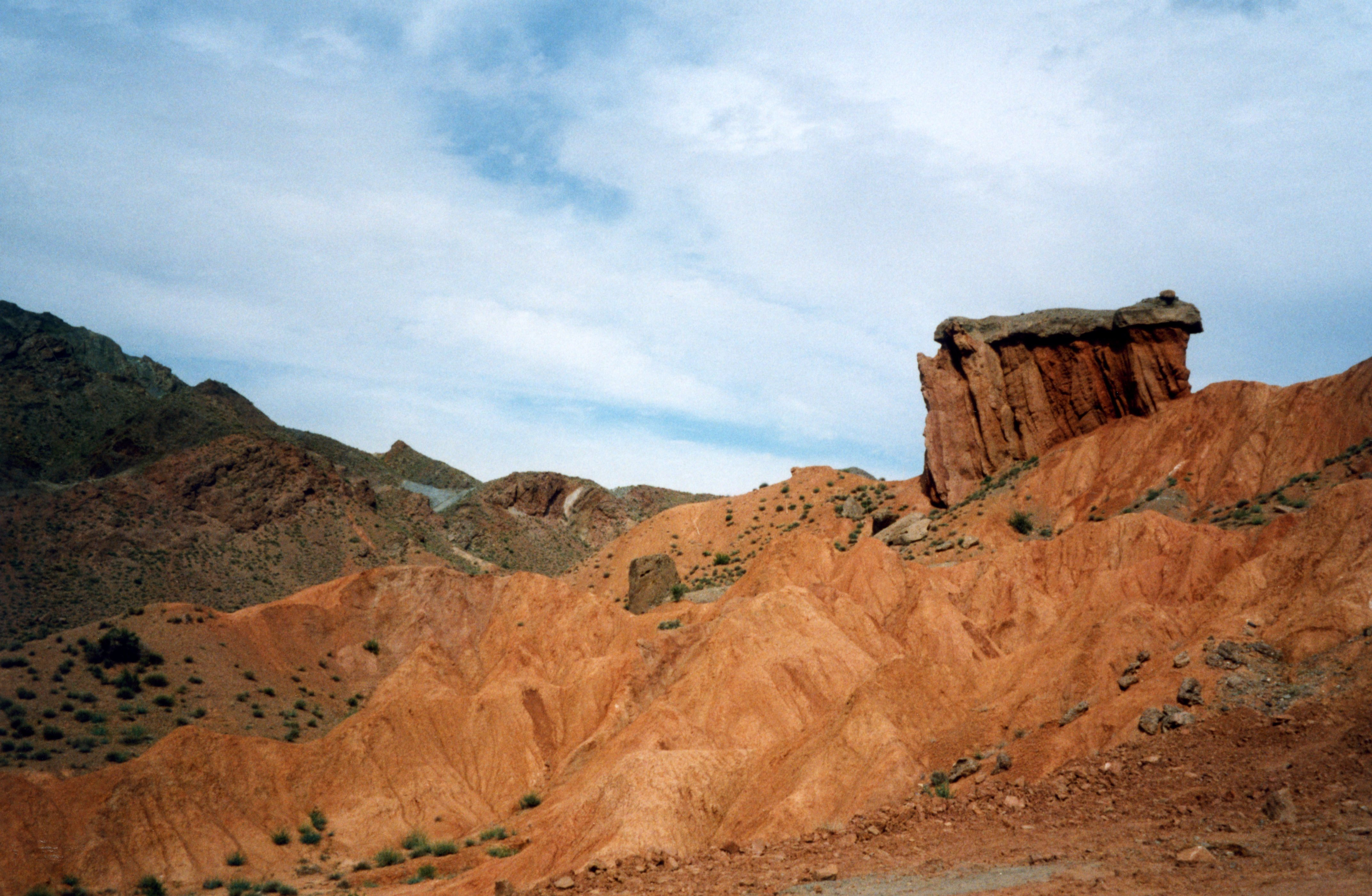 Le désert Iranian comprend deux zones distinctes, le Dasht-e-Kavir, ou désert de Kavir, et le Dasht-e-Lut, ou désert de Lut. Le mot perse "dash" signifie “desert”. En gros, sur le trajet qui va de Machad à Ispahan, le Dasht-e-Kavir est côté nord, et le Dasht-e-lut est côté sud. Le Dasht-e-Lut comprend de riches réserves de pétrole.